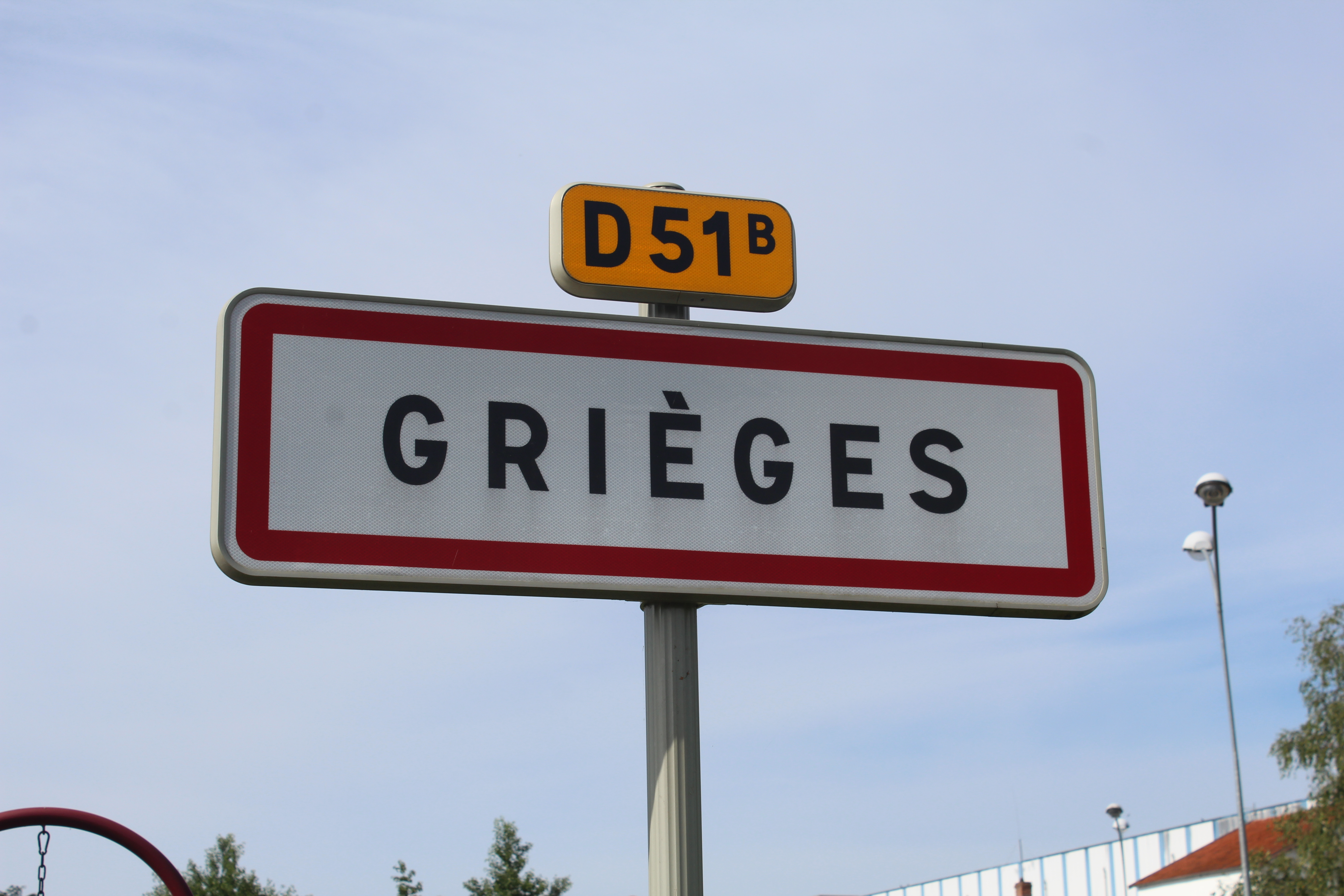 Panneau d'entrée dans Grièges.